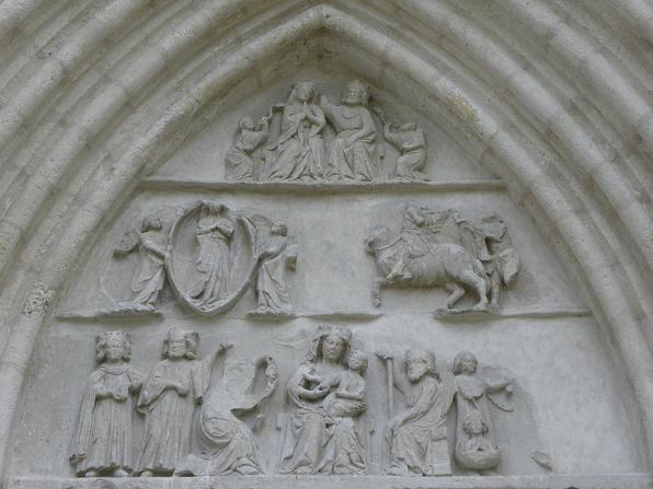 Tympan de la collégiale N.D de l'Assomption de La Chapelle sur Crécy, commune de Crécy-la-Chapelle (77).